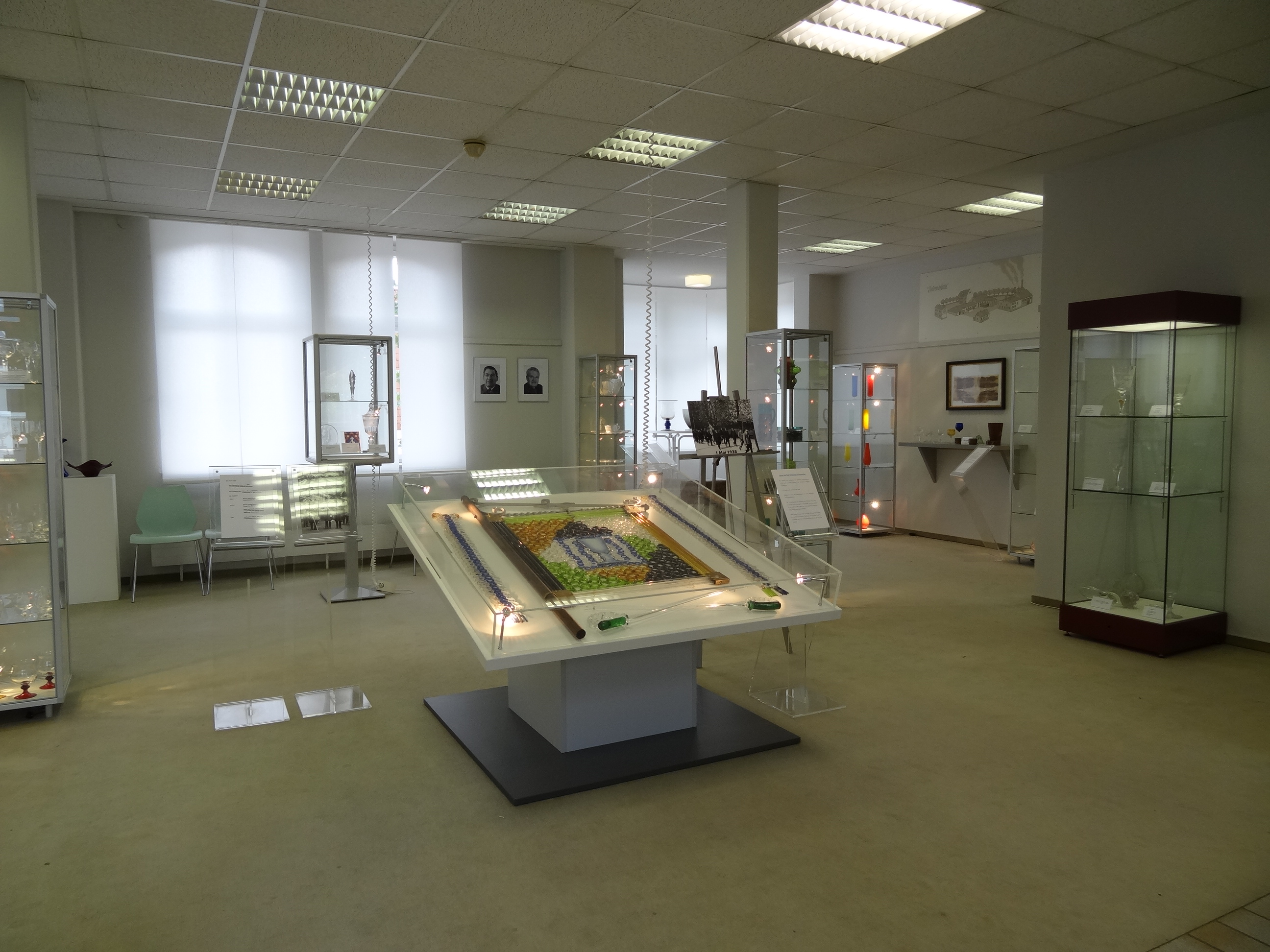 Glasmuseum Bad DriburgThis is a photograph of an architectural monument., no. A 47